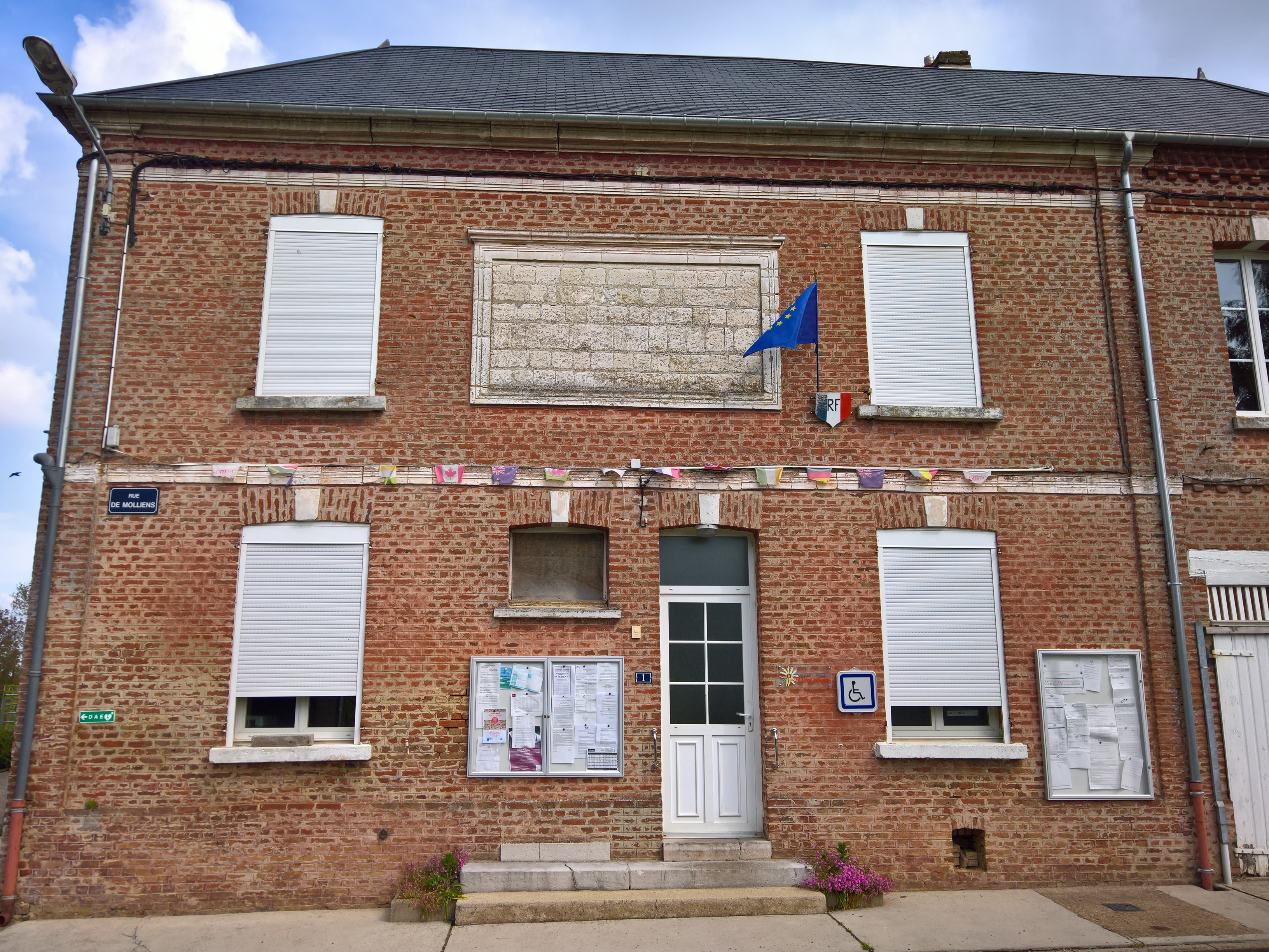 Camps-en-Amienois : La mairie